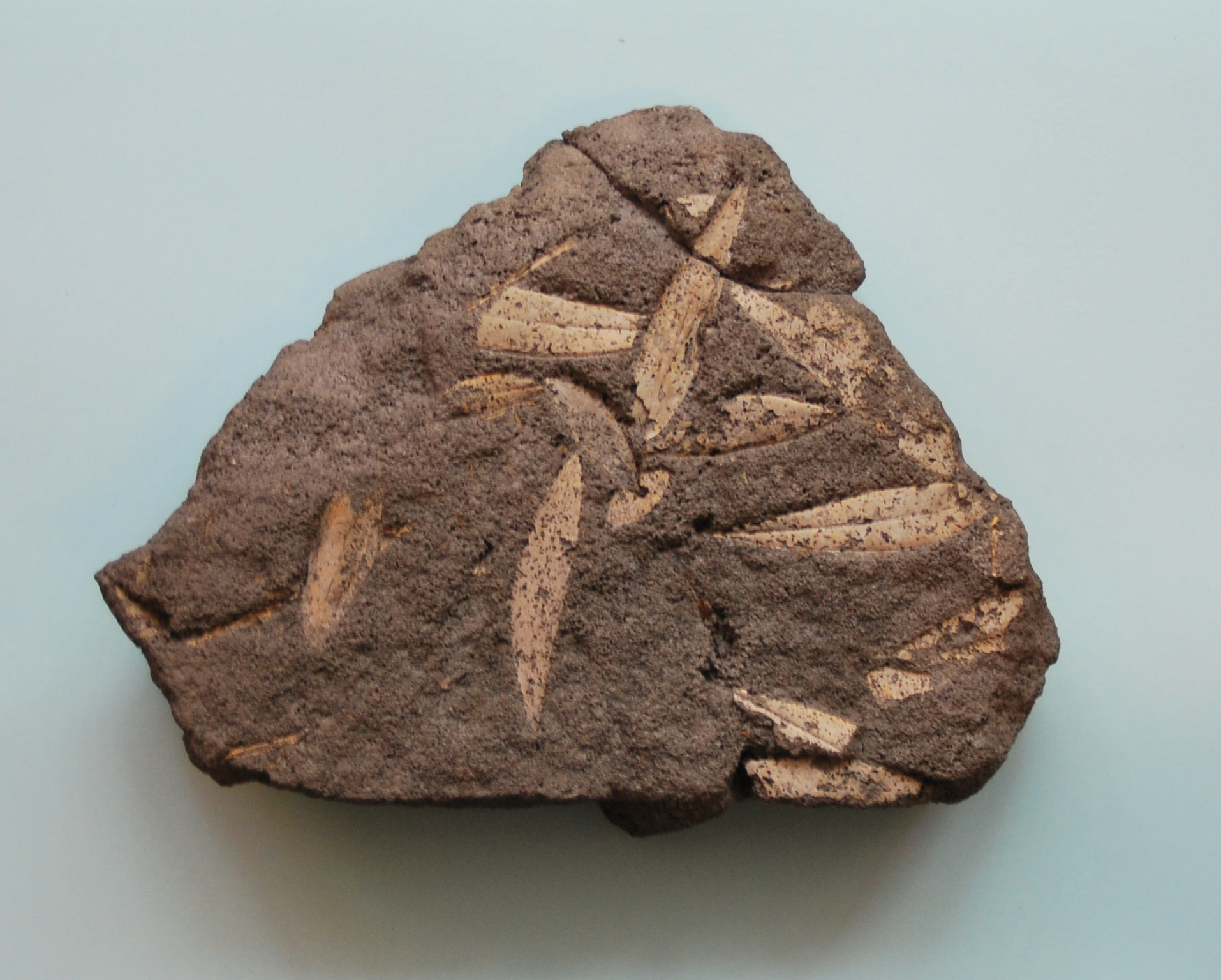 Fossile Blattabdrücke von Olea europaea. FO: Fira/Santorin (GR). Alter 54 000 a BP. Tephra aus einen regionalen Einschaltung zwischen den Straten Upper Scoriae und Vouroulos bei Fira.